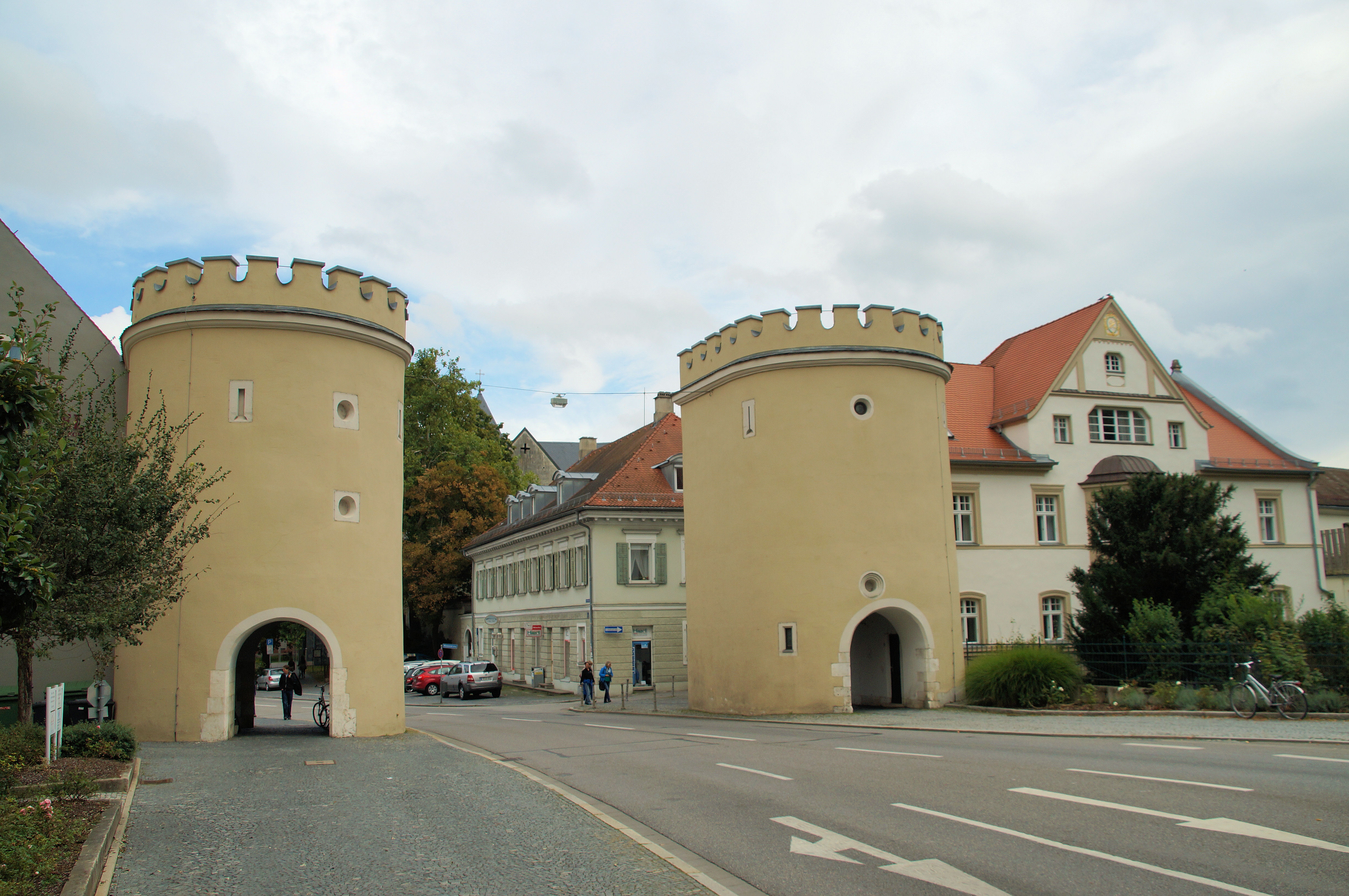 Jakobstor, zwei halbrunde dreigeschossige Flankierungstürme des Torausgangs zur Brücke über den Stadtgraben an der ehem. Innenseite des Grabens ; mit Zinnenkranz von 1821-25 (gotisiert), Umbauten und Abbruch des Mittelteils 1955. Torturm in der Jacobsstraße und Wehrturm südlich der Brücke vor der Stadtmauer abgebrochen Mitte des 19. Jhd. This is a photograph of an architectural monument.